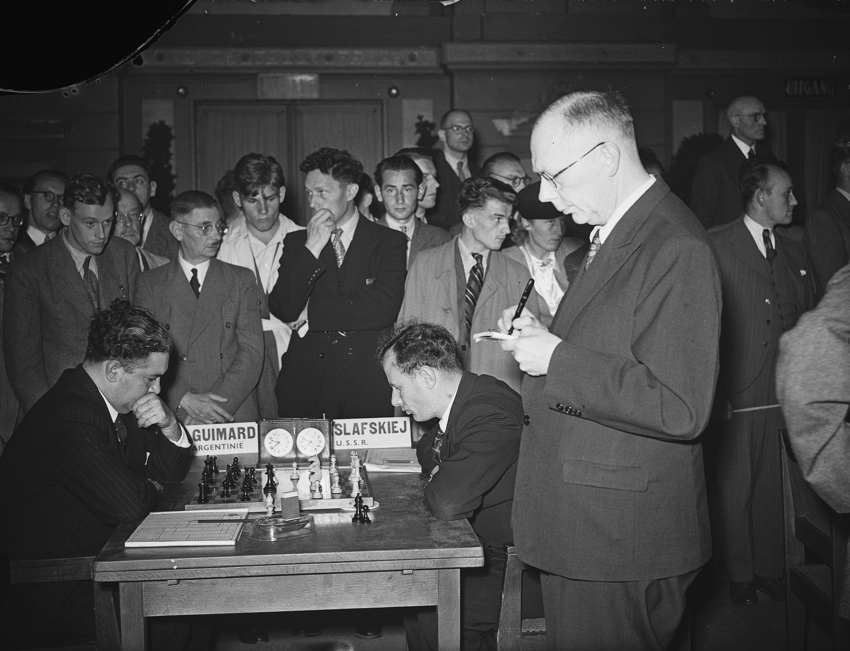 Collectie / Archief : Fotocollectie Anefo Reportage / Serie : [ onbekend ] Beschrijving : Schaaktoernooi Groningen Datum : 12 augustus 1946 Locatie : Groningen Trefwoorden : SCHAAKTOURNOOI Fotograaf : Fotograaf Onbekend / Anefo Auteursrechthebbende : Nationaal Archief Materiaalsoort : Glasnegatief Nummer archiefinventaris : bekijk toegang 2.24.01.09 Bestanddeelnummer : 901-8914